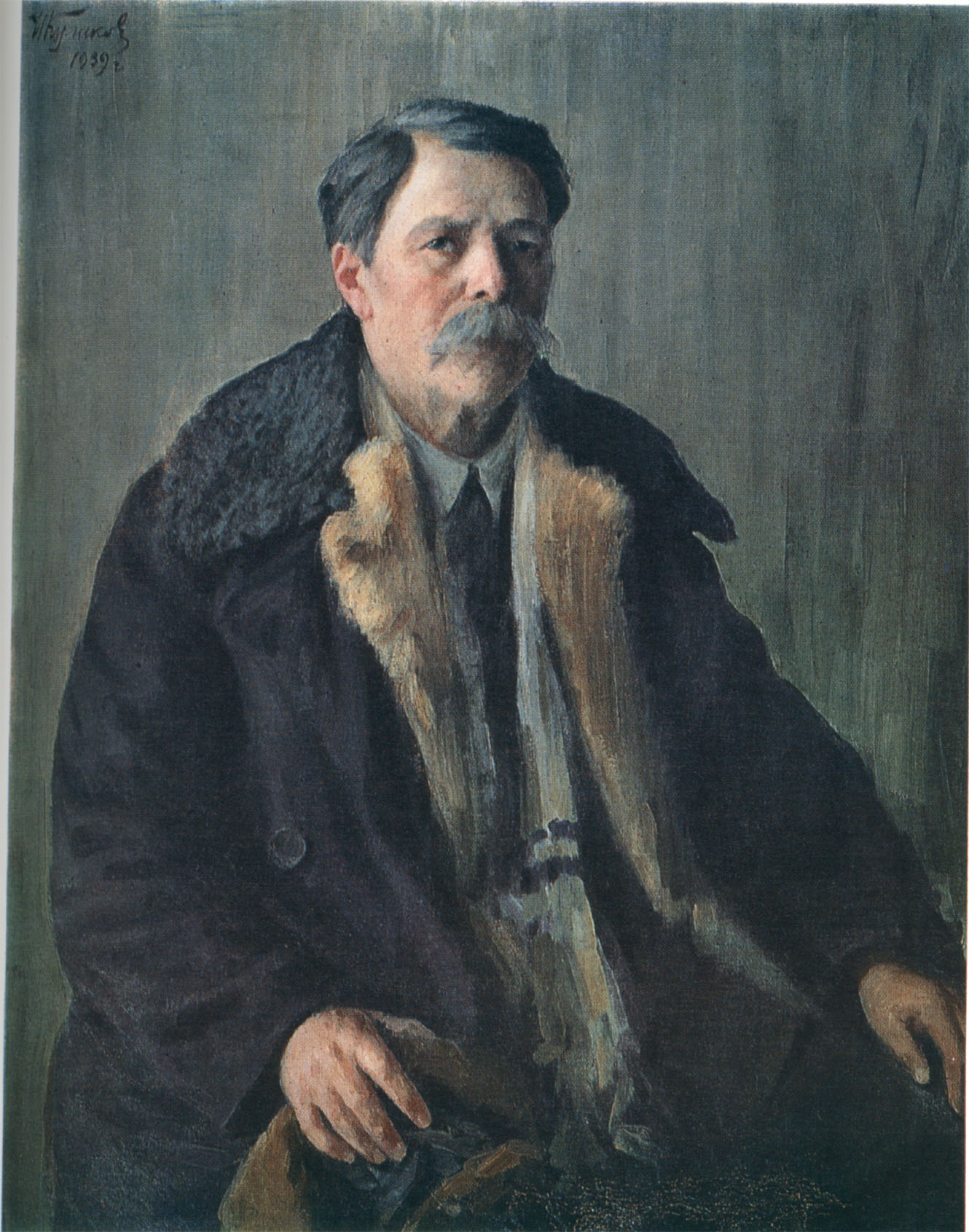 Куликов И.С. Автопортрет, 1939